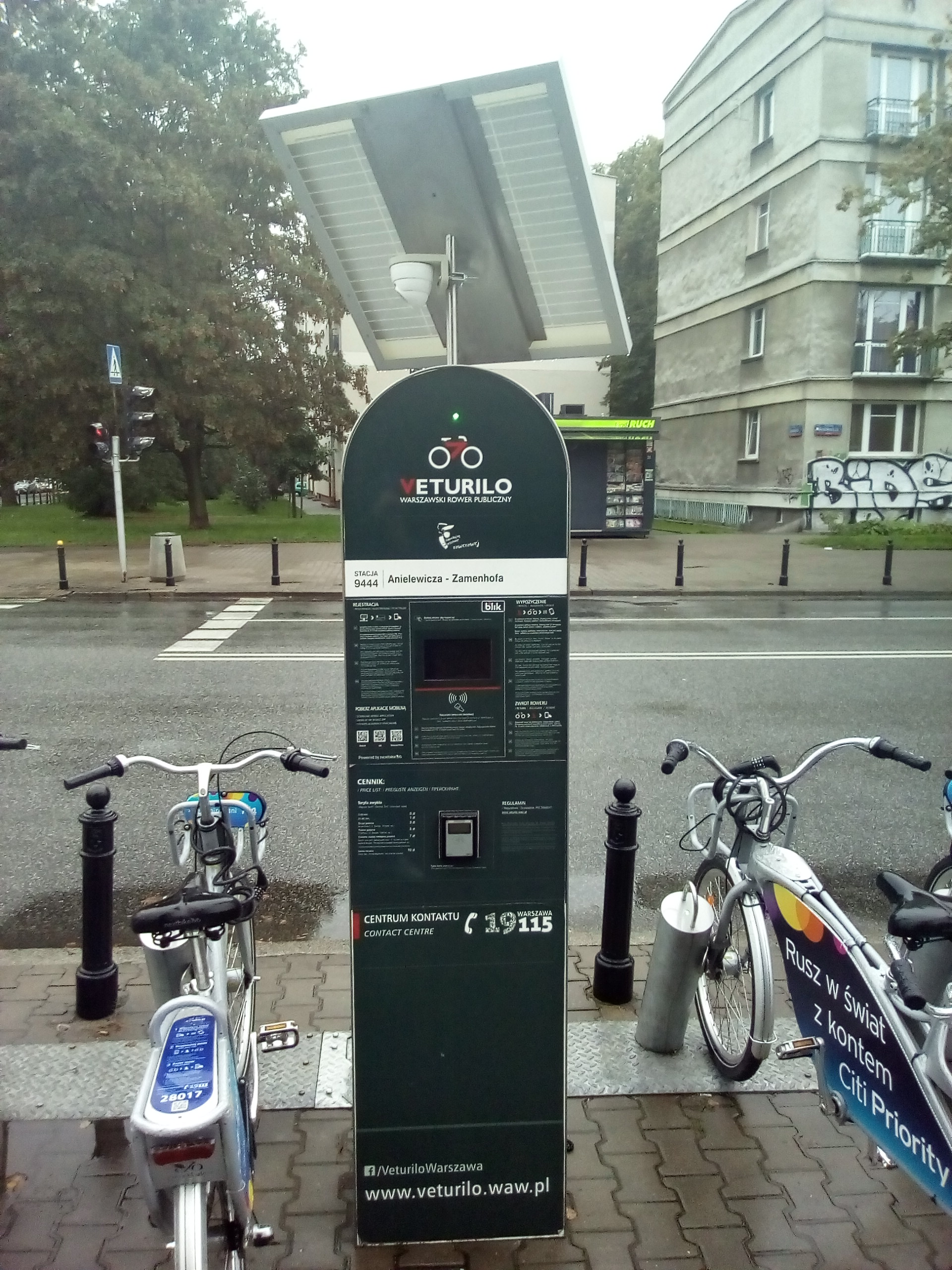 Stacio nr-o 9444 de Varsovia urba prunteprena bicikla sistemo Veturilo. The code number of this Zamenhof/Esperanto object is pl-052. Wikidata has entry Q57081548 with data related to this item.